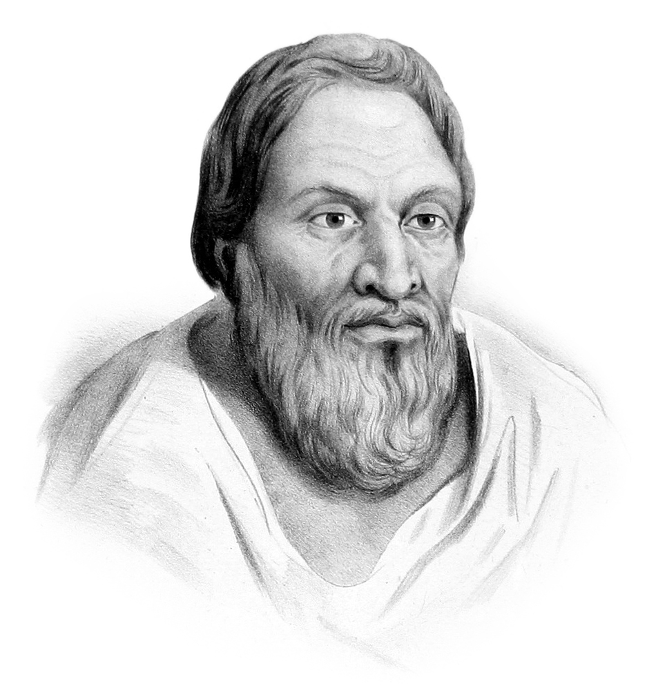 Matoua, l'oncle du roi Mapou-Teoa. Atlas pittoresque, planche 48